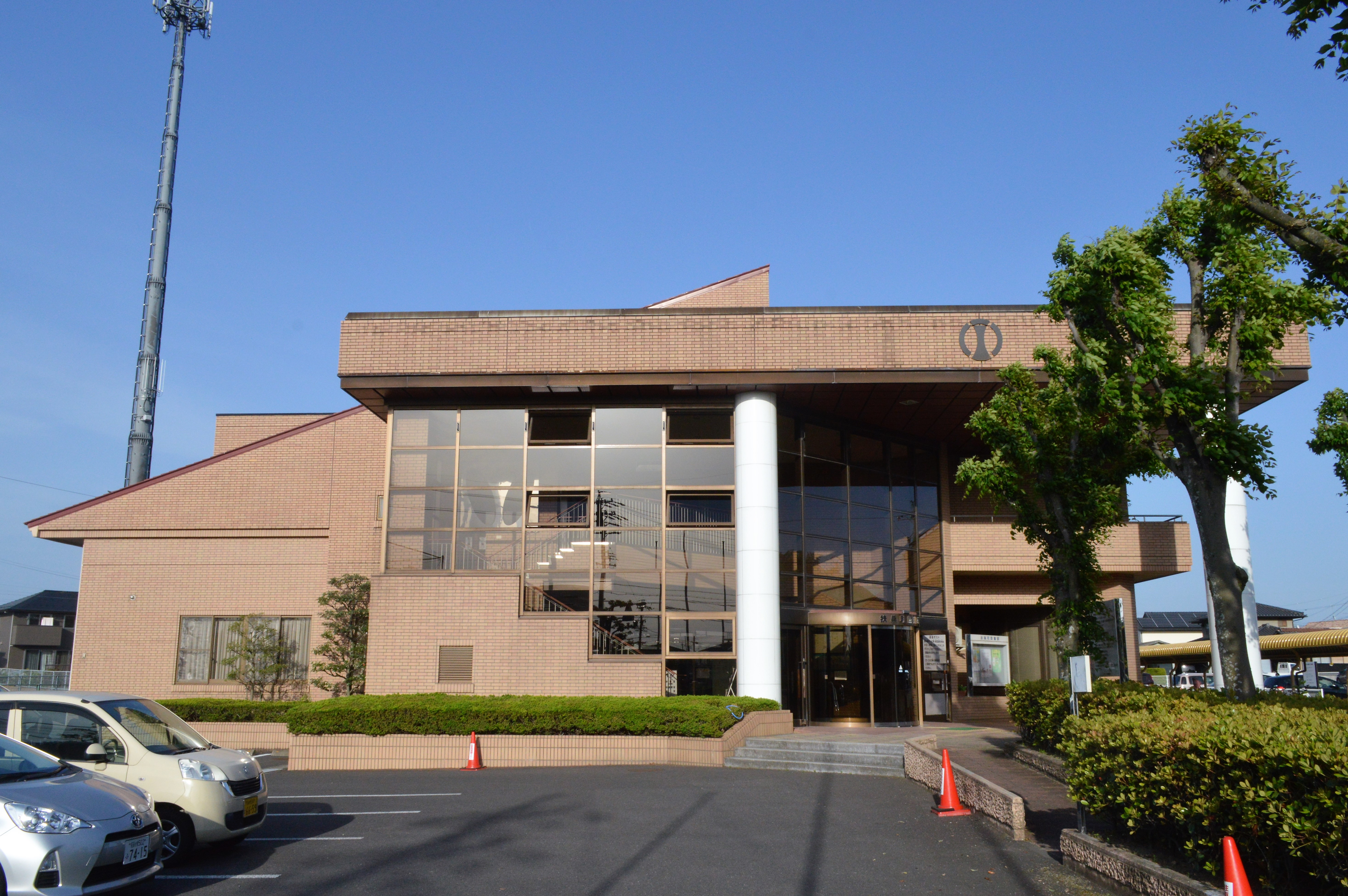 愛知県丹羽郡扶桑町の扶桑町図書館。